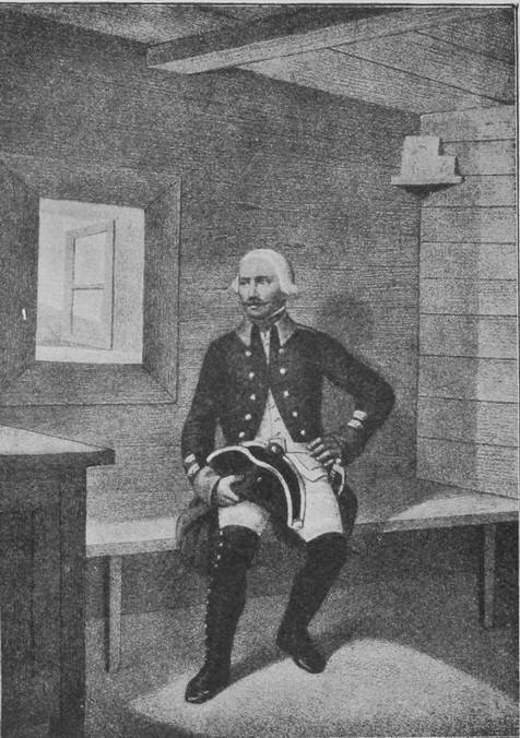 Данное изображение было использовано в статье «Брянский, 35-й пехотный, генерал-адъютанта князя Горчакова I, полк» опубликованной в пятом томе «Военной энциклопедии», который был издан книгоиздательским товариществом Ивана Дмитриевича Сытина в 1911 году в столице Российской империи городе Санкт-Петербурге. Изначально — иллюстрация №951 в 7 томе Исторического описания одежды и вооружения российских войск.